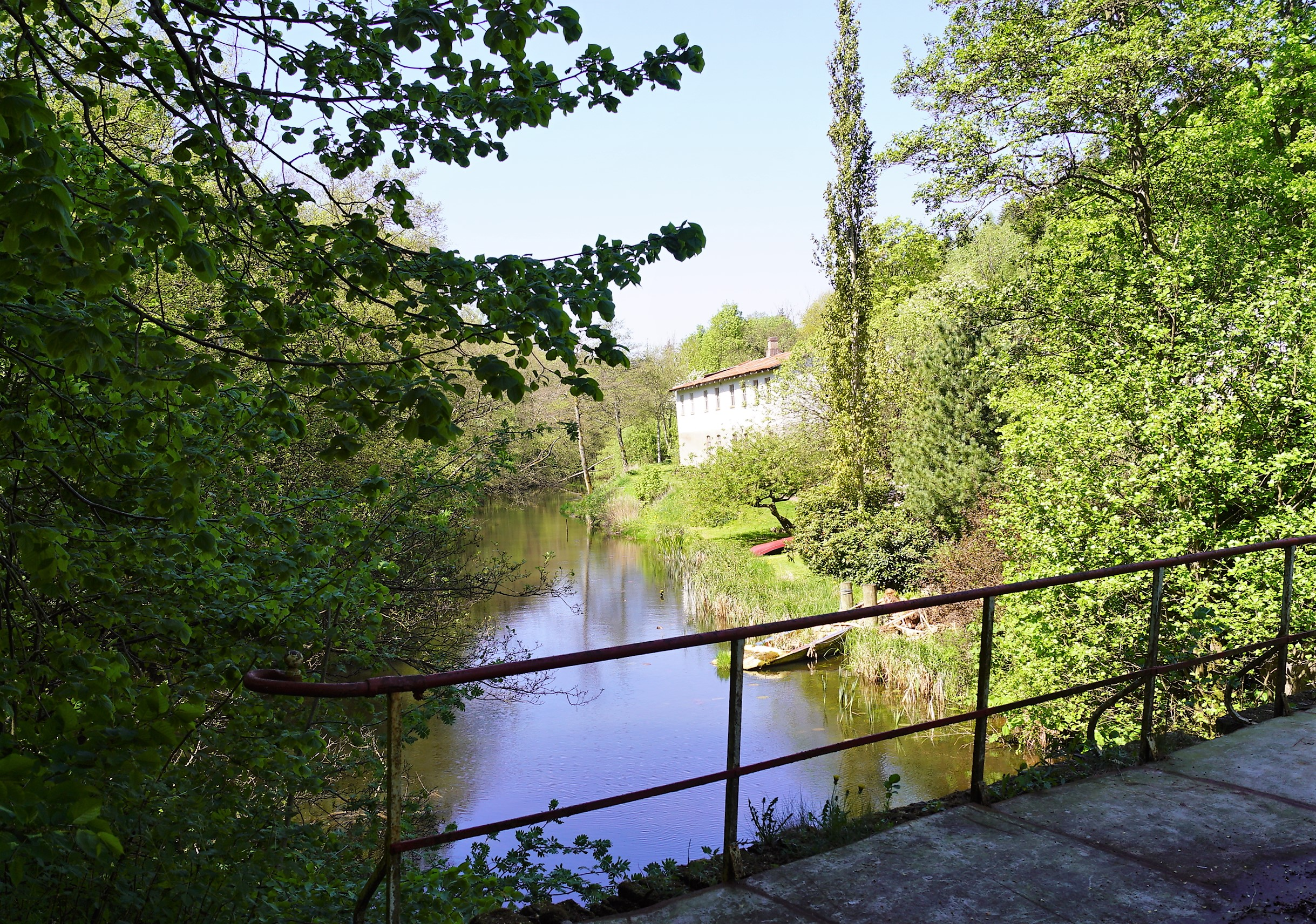 Alling Å set mod vest ved Alling Bro